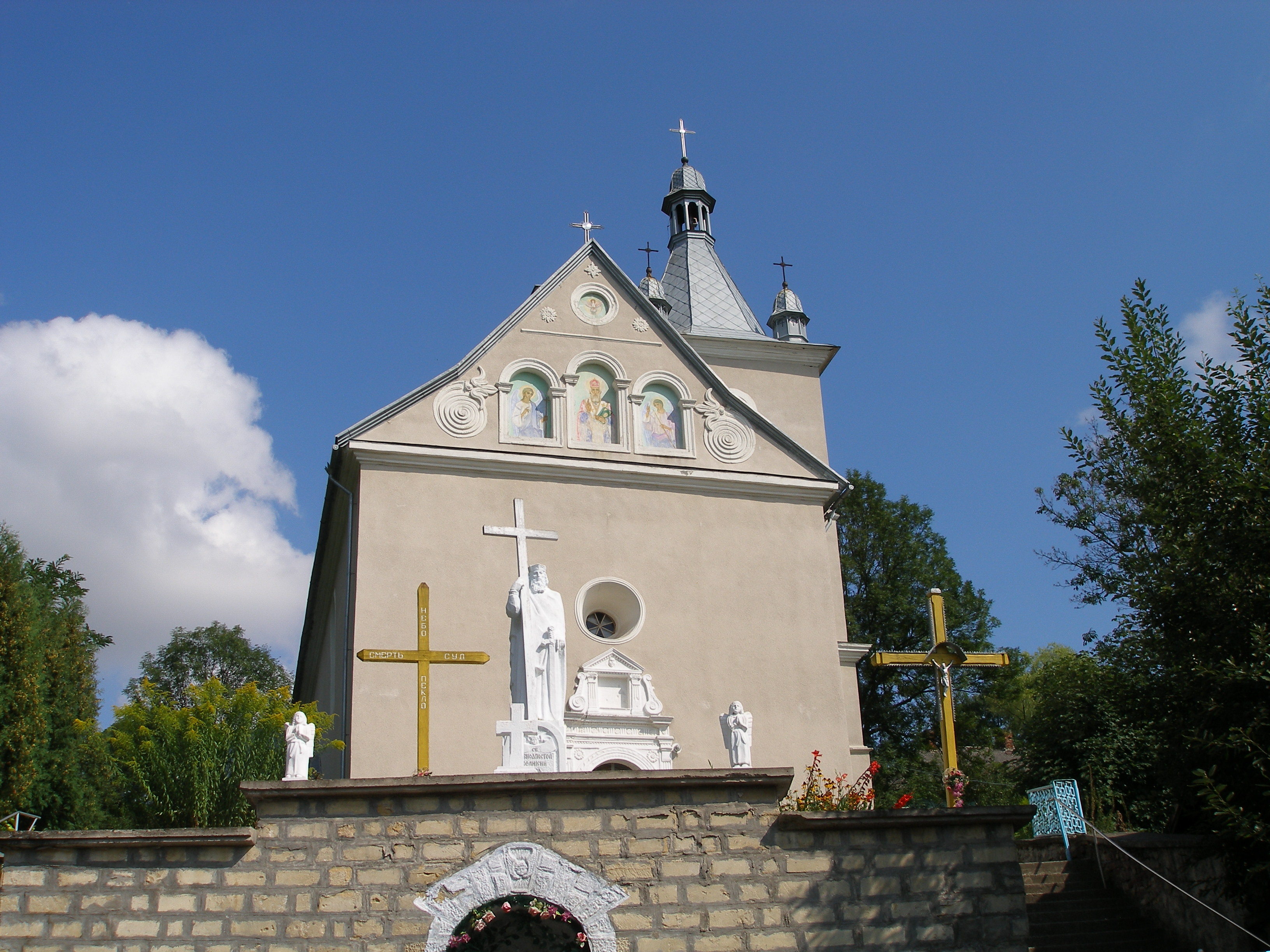 Cerkiew pw. św. Mikołaja (dawny kościół ormiański) w Jazłowcu